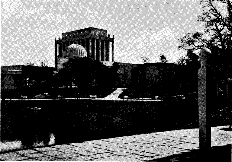 Näckrosdammen och Minneshallen vid Göteborgsutställningen 1923 från en bild i Svenska dagbladets årsbok 1923 tillgänglig via projekt Runeberg. Bildtext: "Näckrosdammen och Minneshallen på Göteborgsutställningen. "